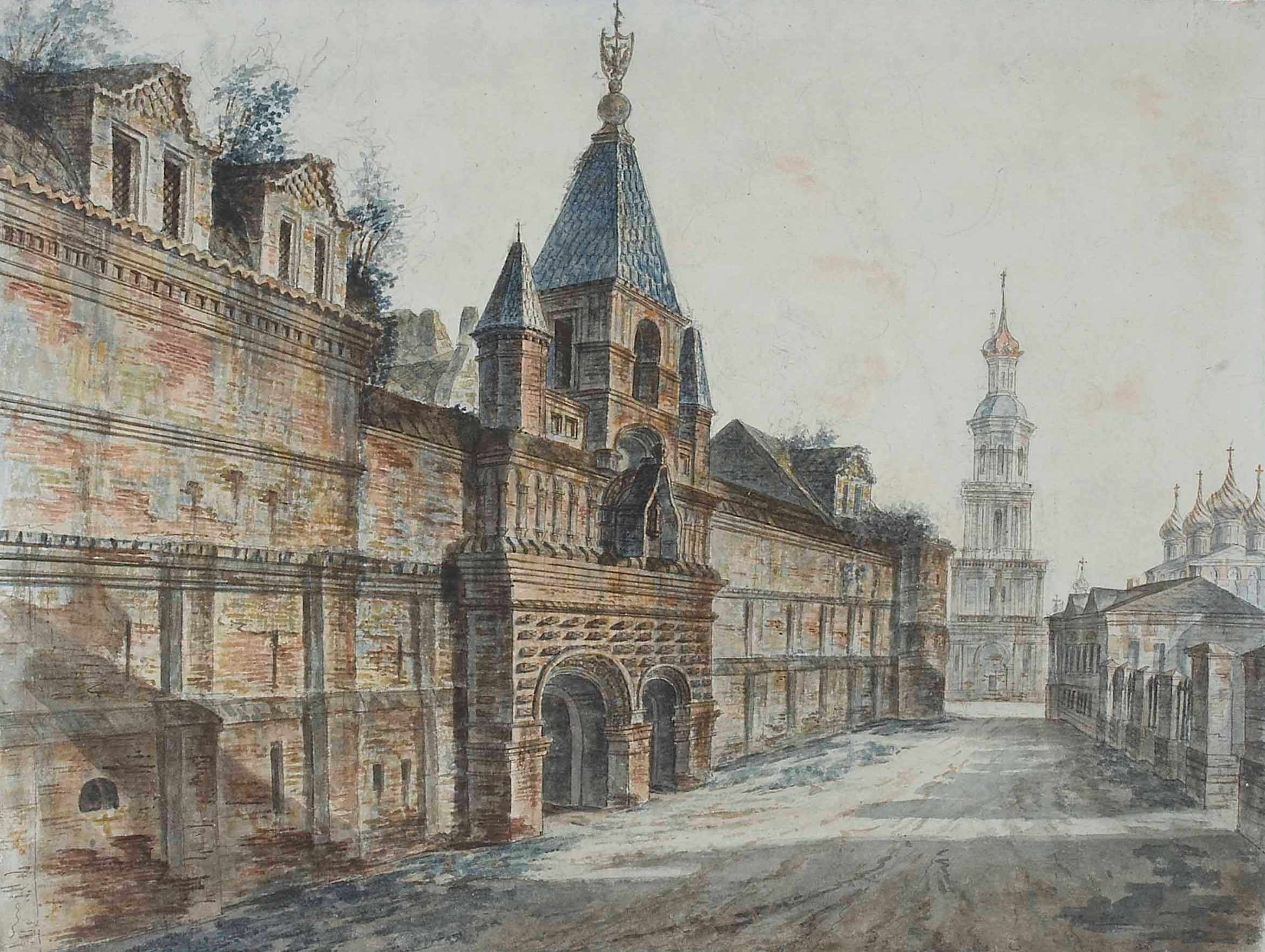 Москва. Кадашевский Хамовный двор (Кадашевский монетный двор 1701-1737)